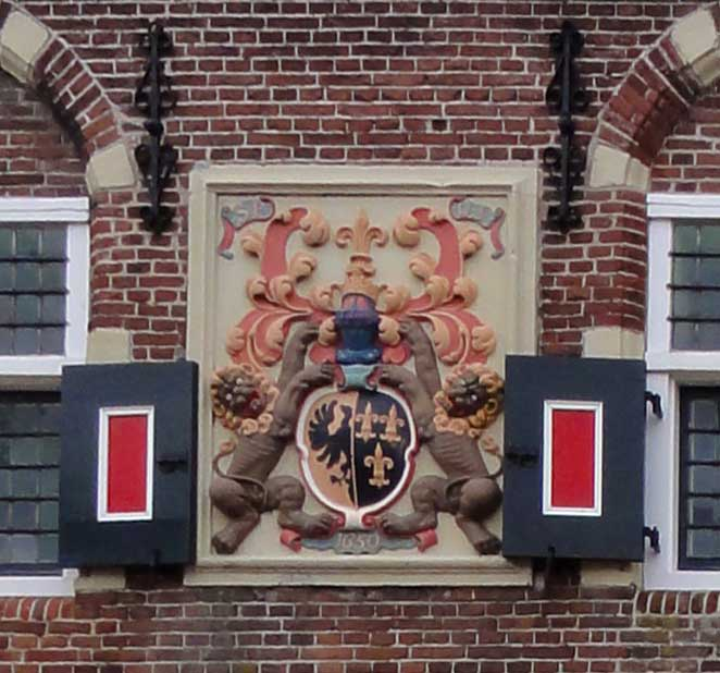 Wapenreliëf uit 1650 aan de Waag te Workum